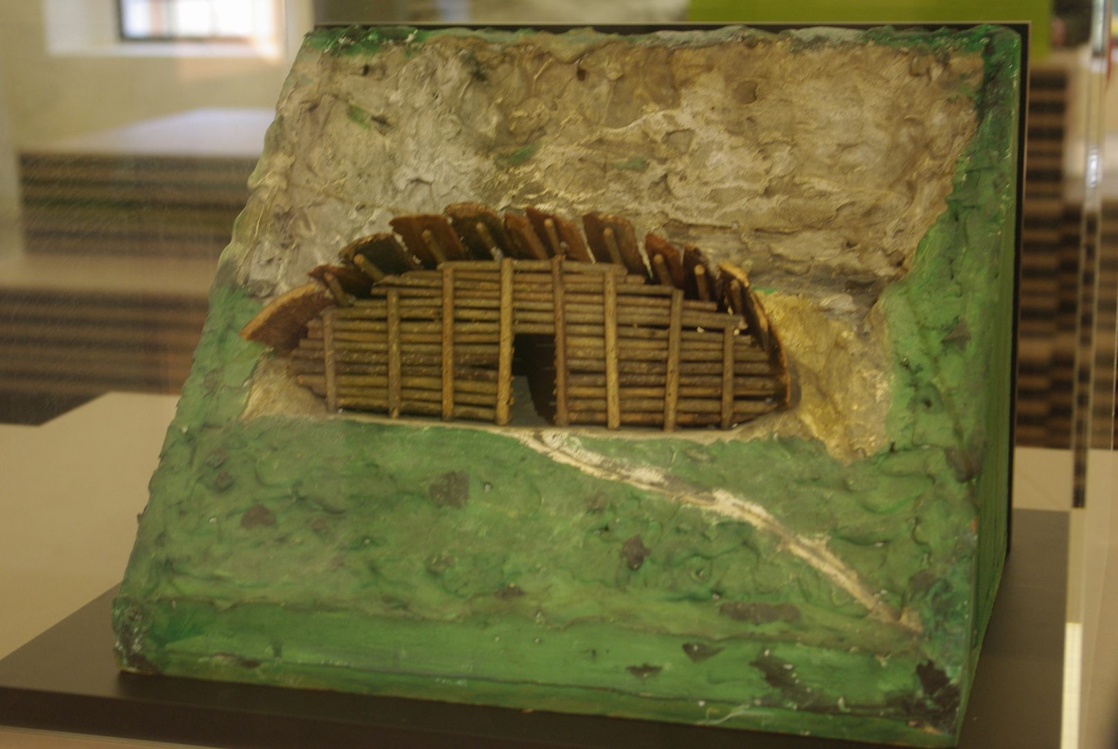 Modell Wohnhütte im Heimatmuseum in Bad Reichenhall